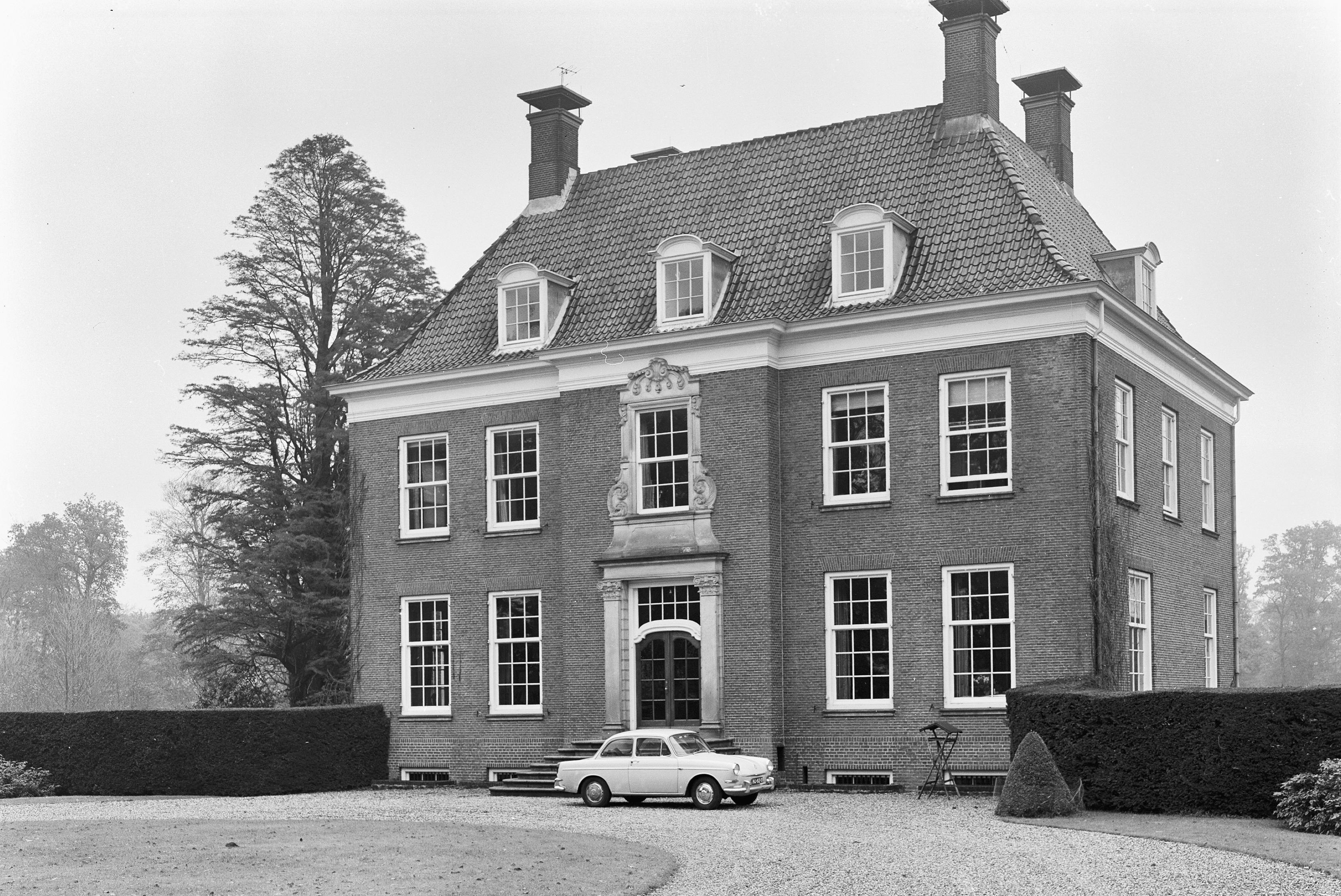 Huis Archem, voor